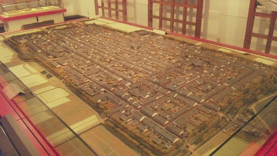 奈良県橿原市今井町の復元模型